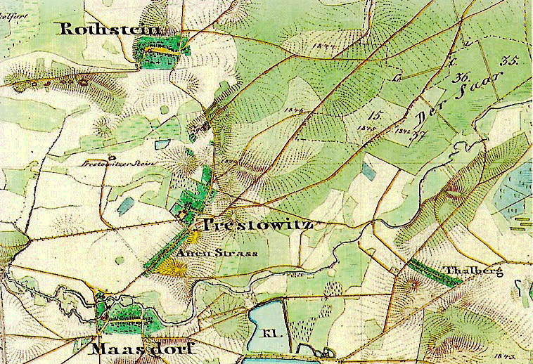 Ausschnitt aus einem Preußischen Untermeßtischblatt Prestewitz von 1847